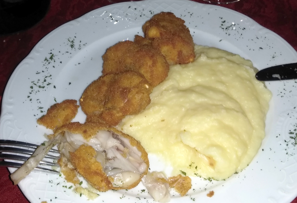 Cosce di rana impanate e fritte con purè di patate (ricetta piemontese)